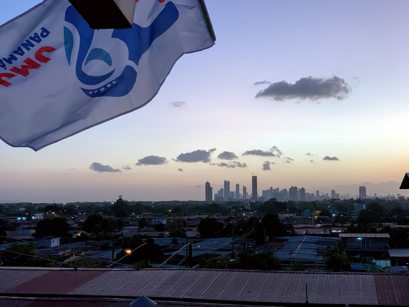 Fotografía tomada a la bandera de la JMJ Panamá 2019, con vista hacia la ciudad de Panamá